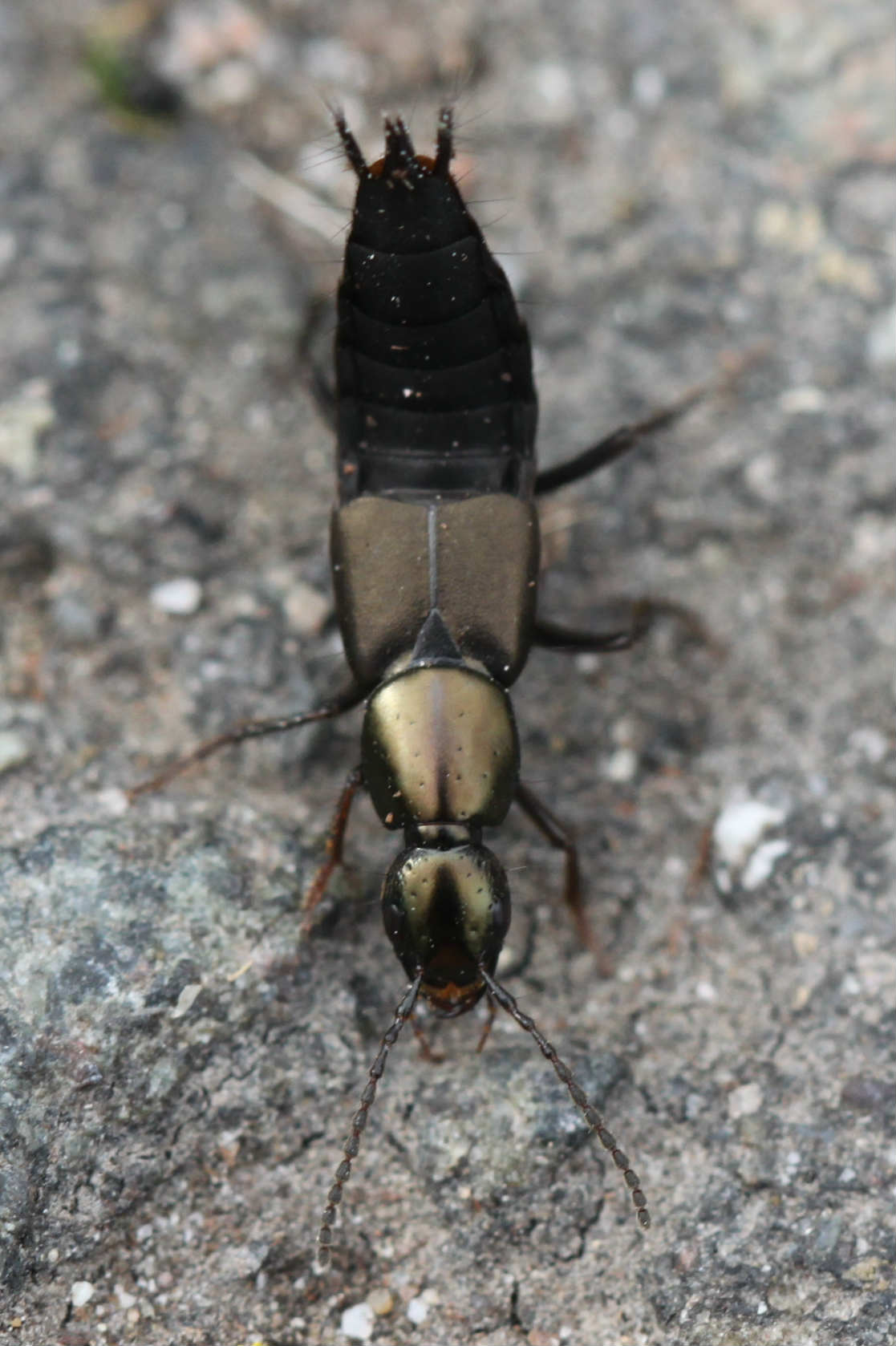 Philonthus cf. decorus am 4.3.2017 in der Schwetzinger Hardt